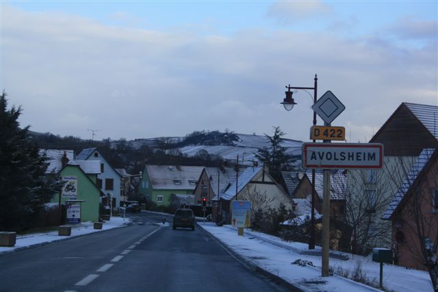 Avolsheim, Alsace